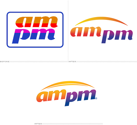 Logos ampm